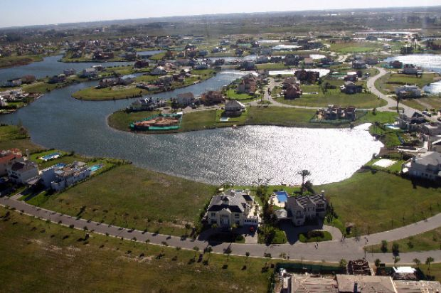 sgsgs